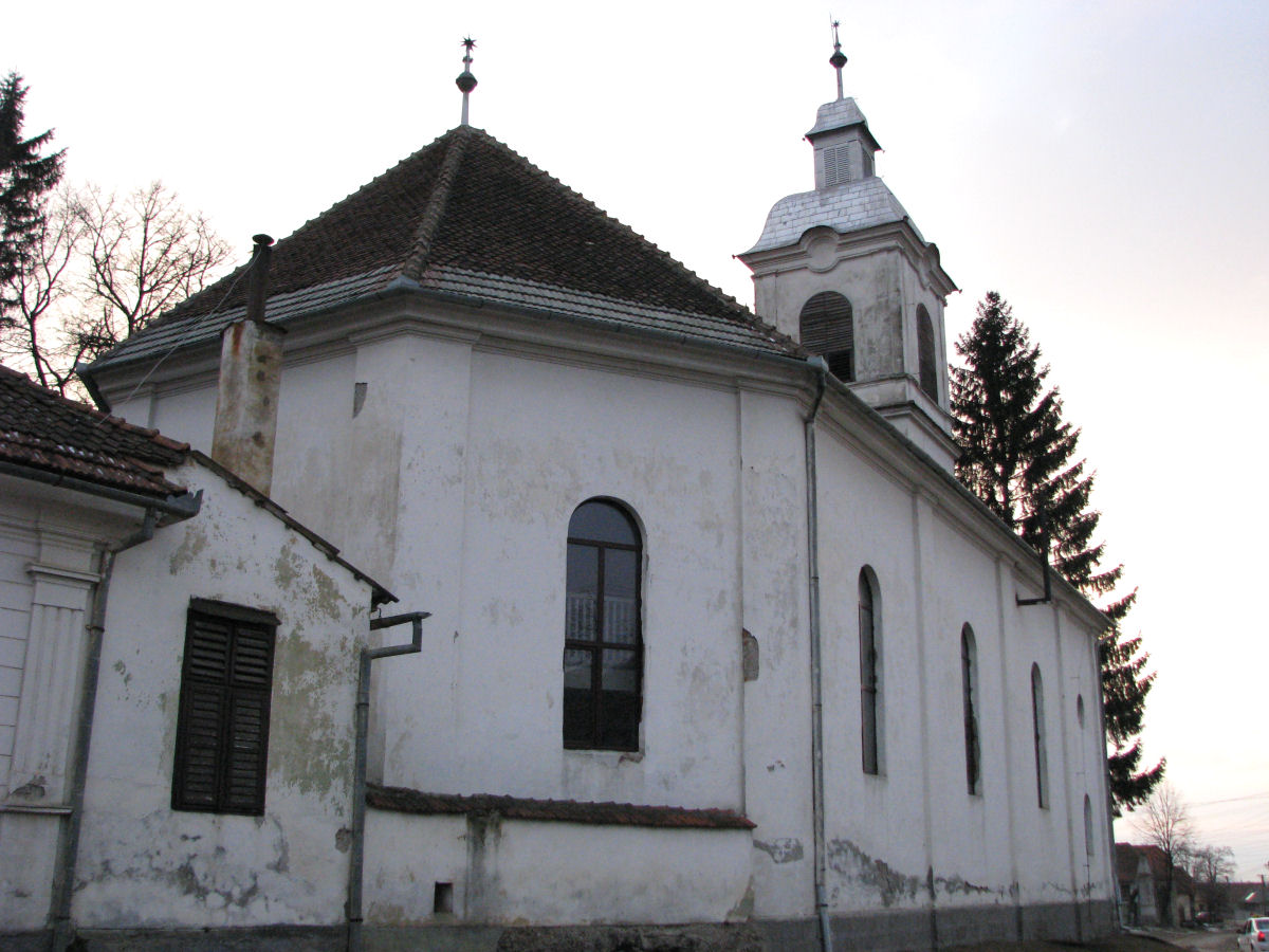 Keresztvári református templom